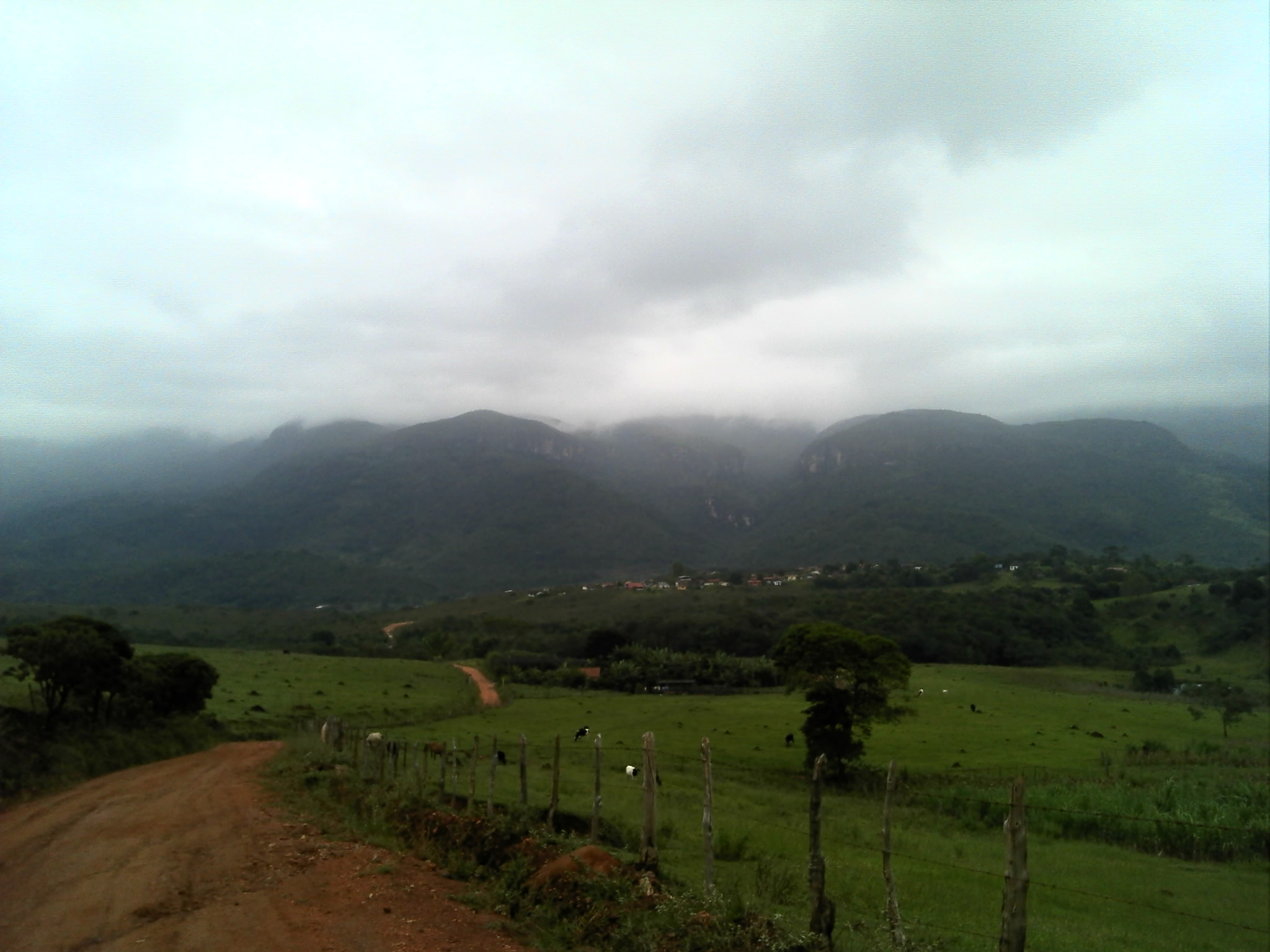 Serra dos Alves ao fundo, MG